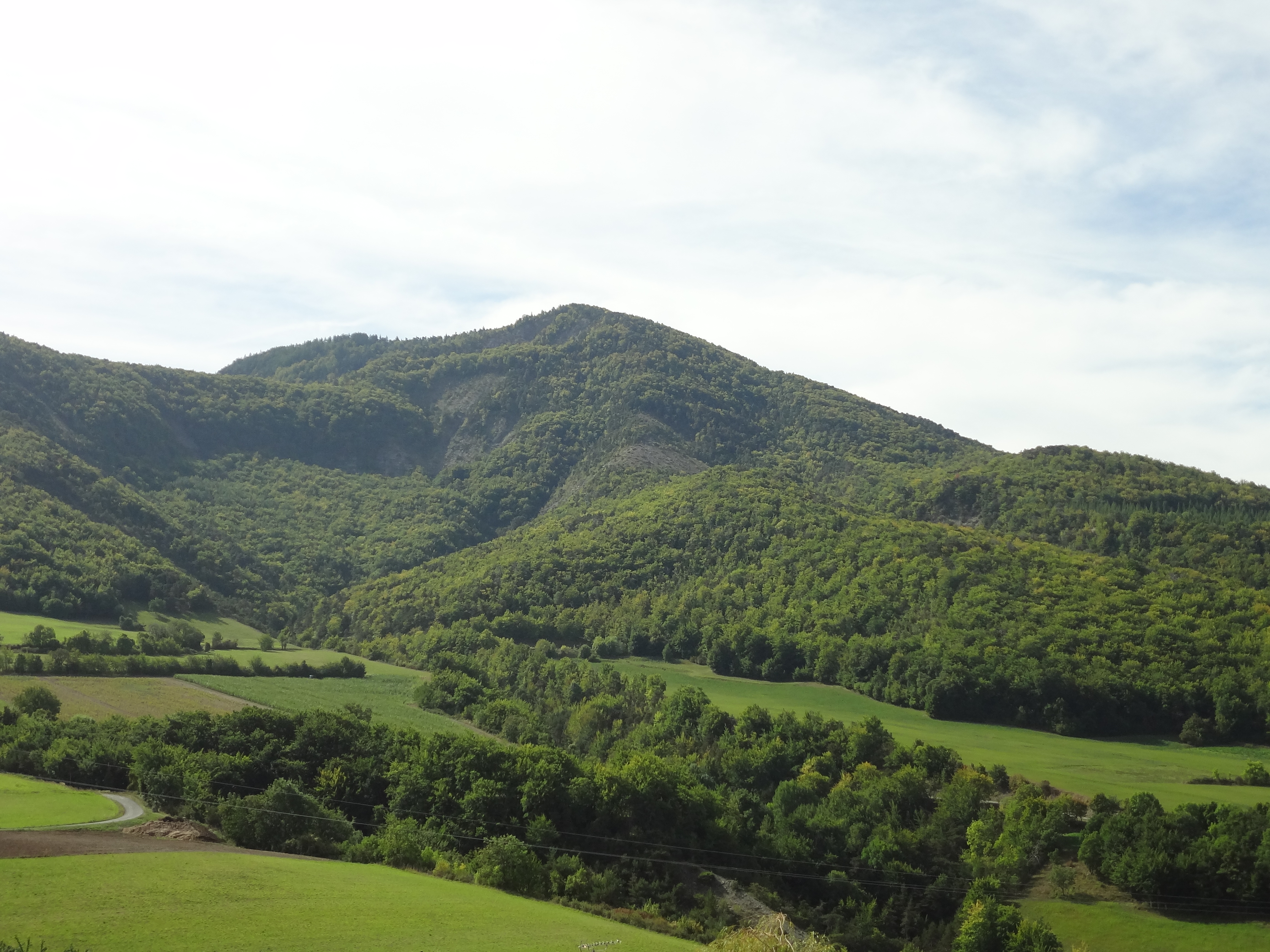 sommet de Montsérieux vu de Piégut (domine le village au sud), 1590 m. Sur la commune de Gigors